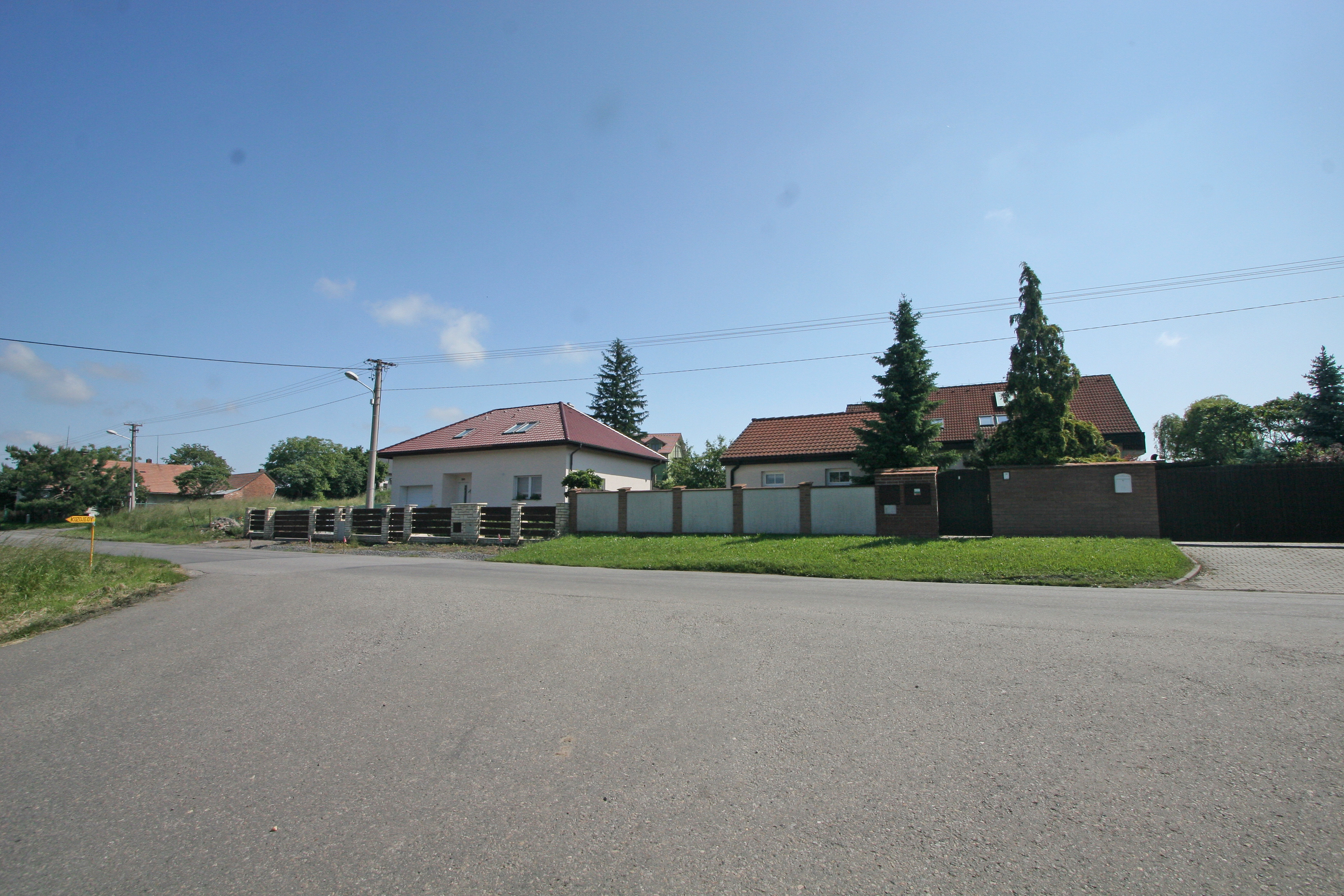 Vrcha čp. 285